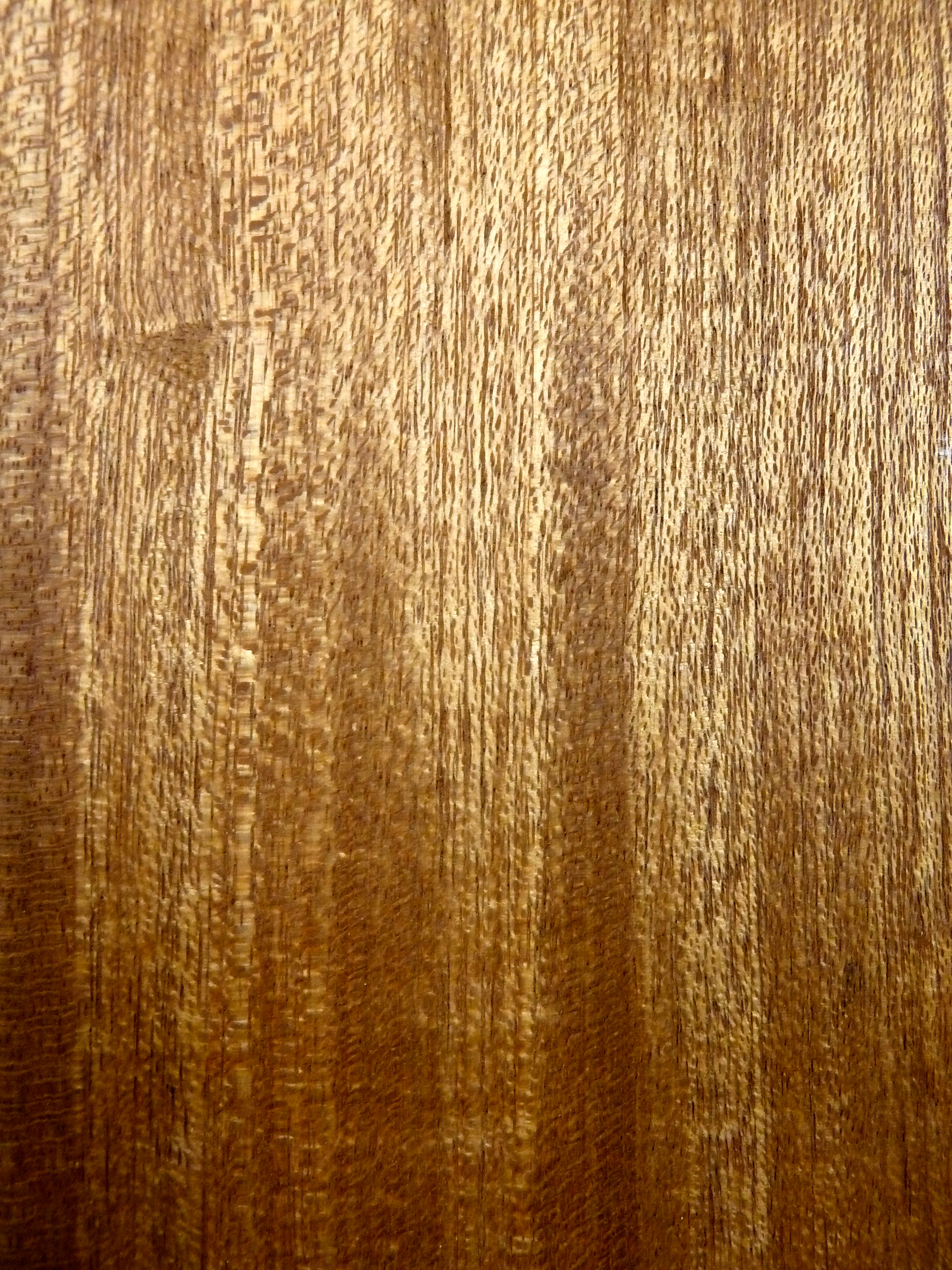 Niangon